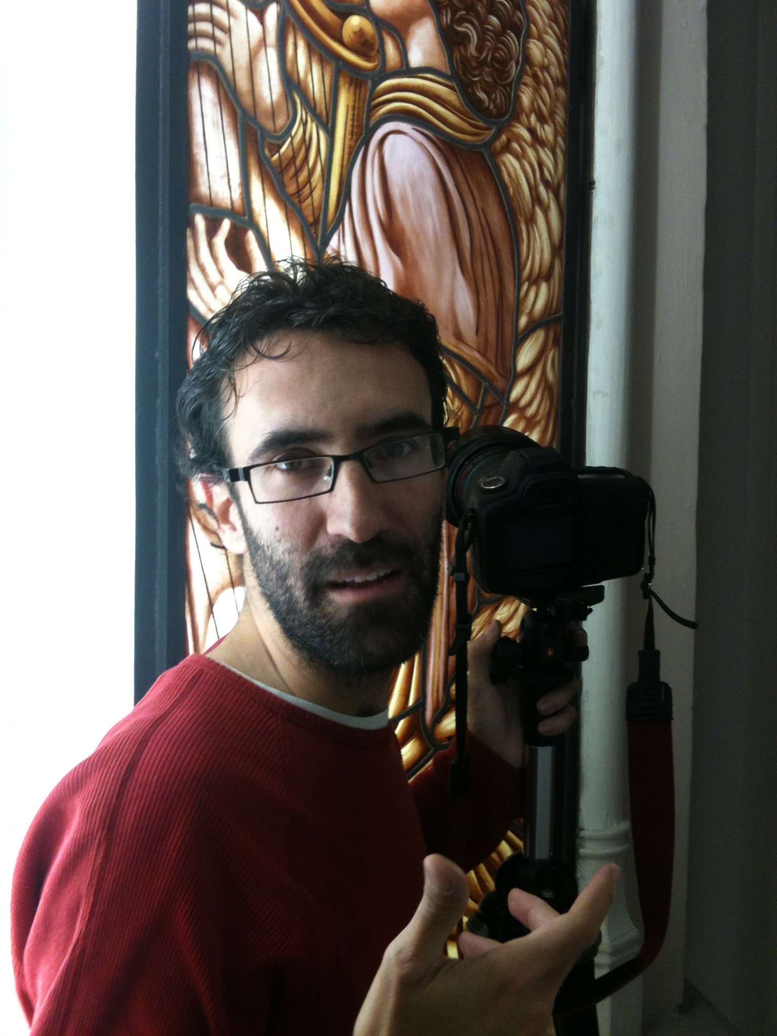 Asís G. Ayerbe en Madrid, 31 de mayo de 2013. Convento de las Hermanas Misioneras del Santísimo Sacramento.